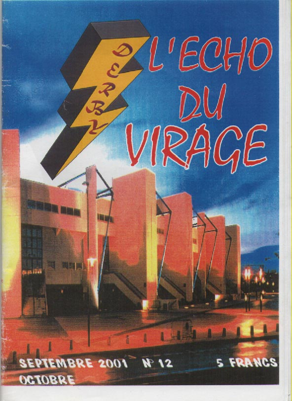 couverture de l'écho du virage numéro 12, septembre-octobre 2001